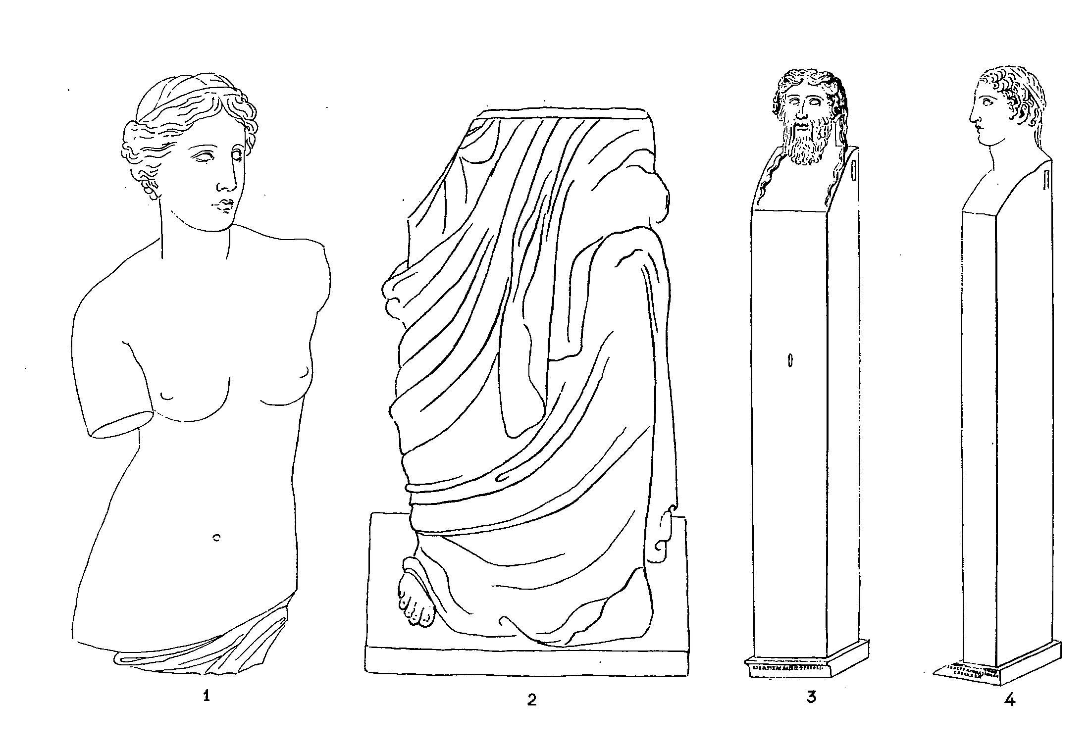 Dessin de la Vénus de Milo au moment de la découverte.